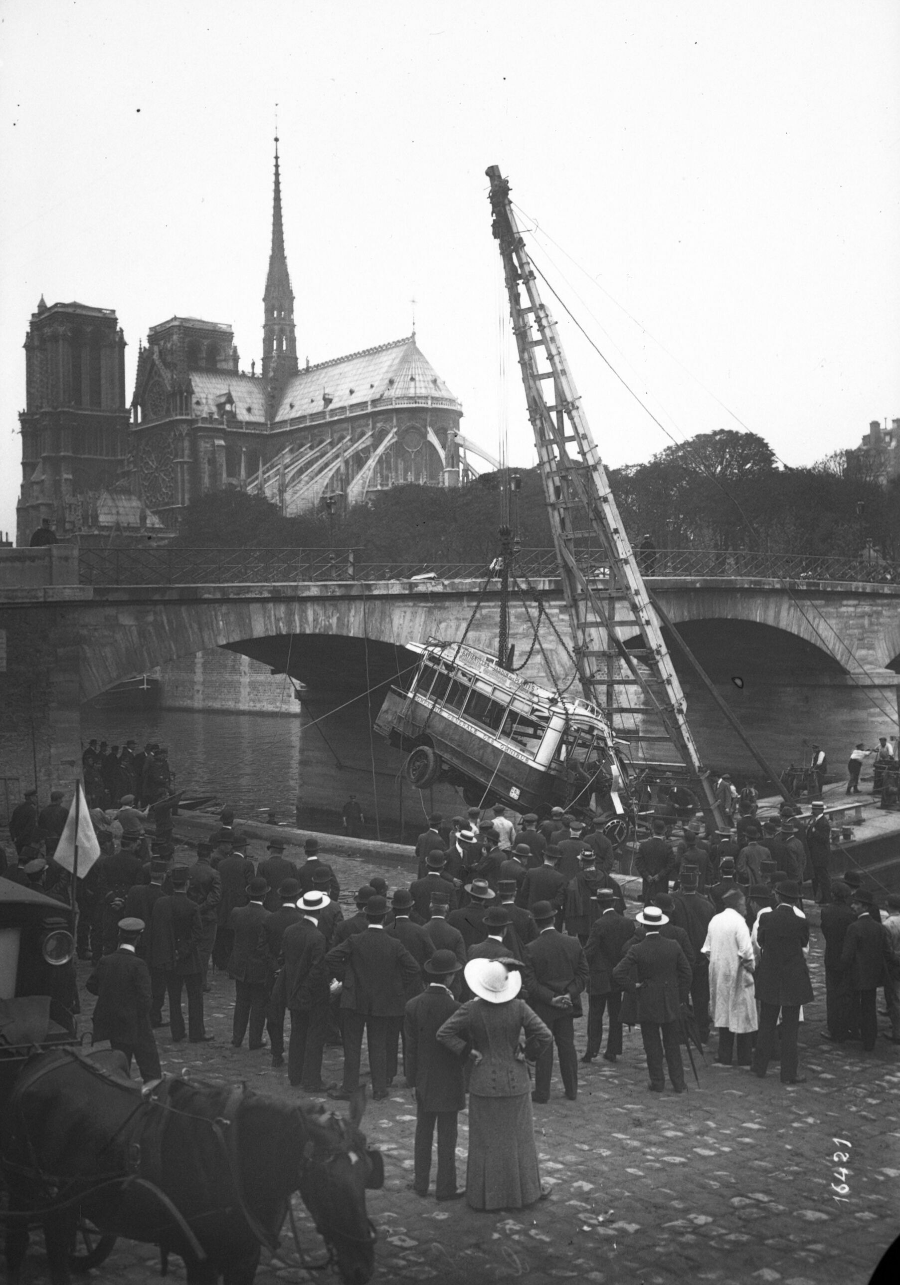 Opération de repêchage d'un autobus de la Compagnie générale des omnibus (ligne G : Batignolles—Jardin des Plantes), tombé du pont de l'Archevêché dans la Seine, le 27 septembre 1911